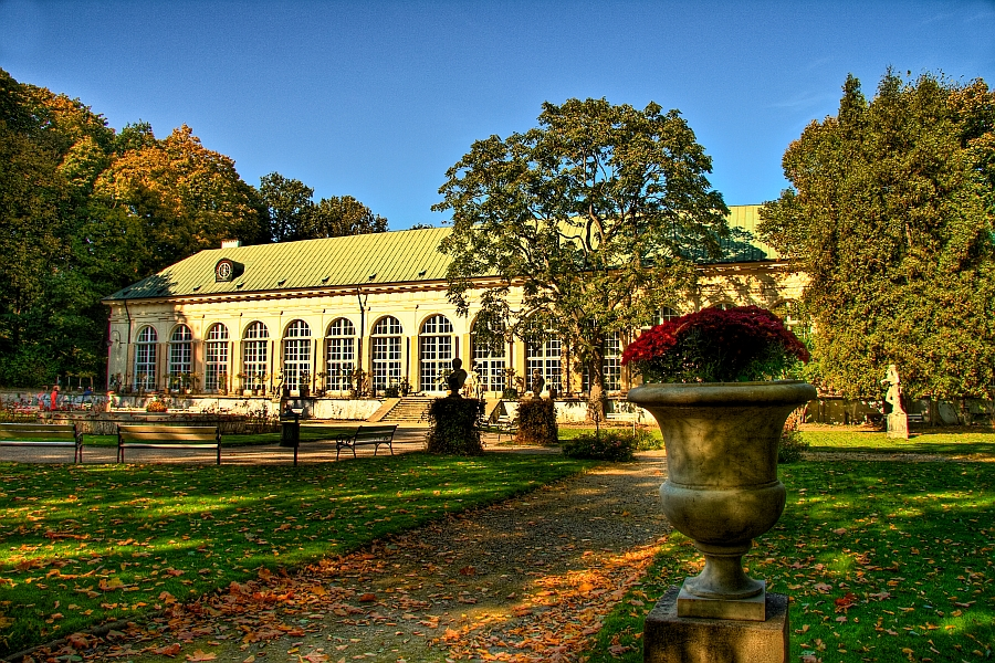 pomarańczarnia